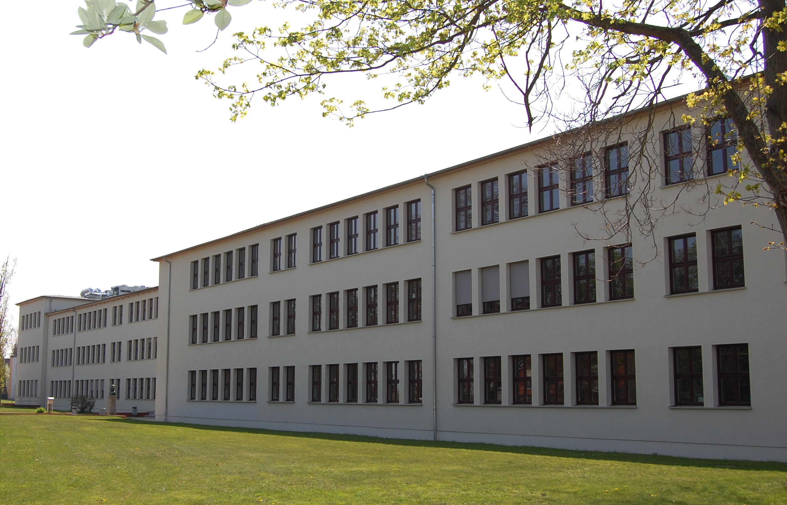 Berufsschule Westerhüsen, Blick von Norden